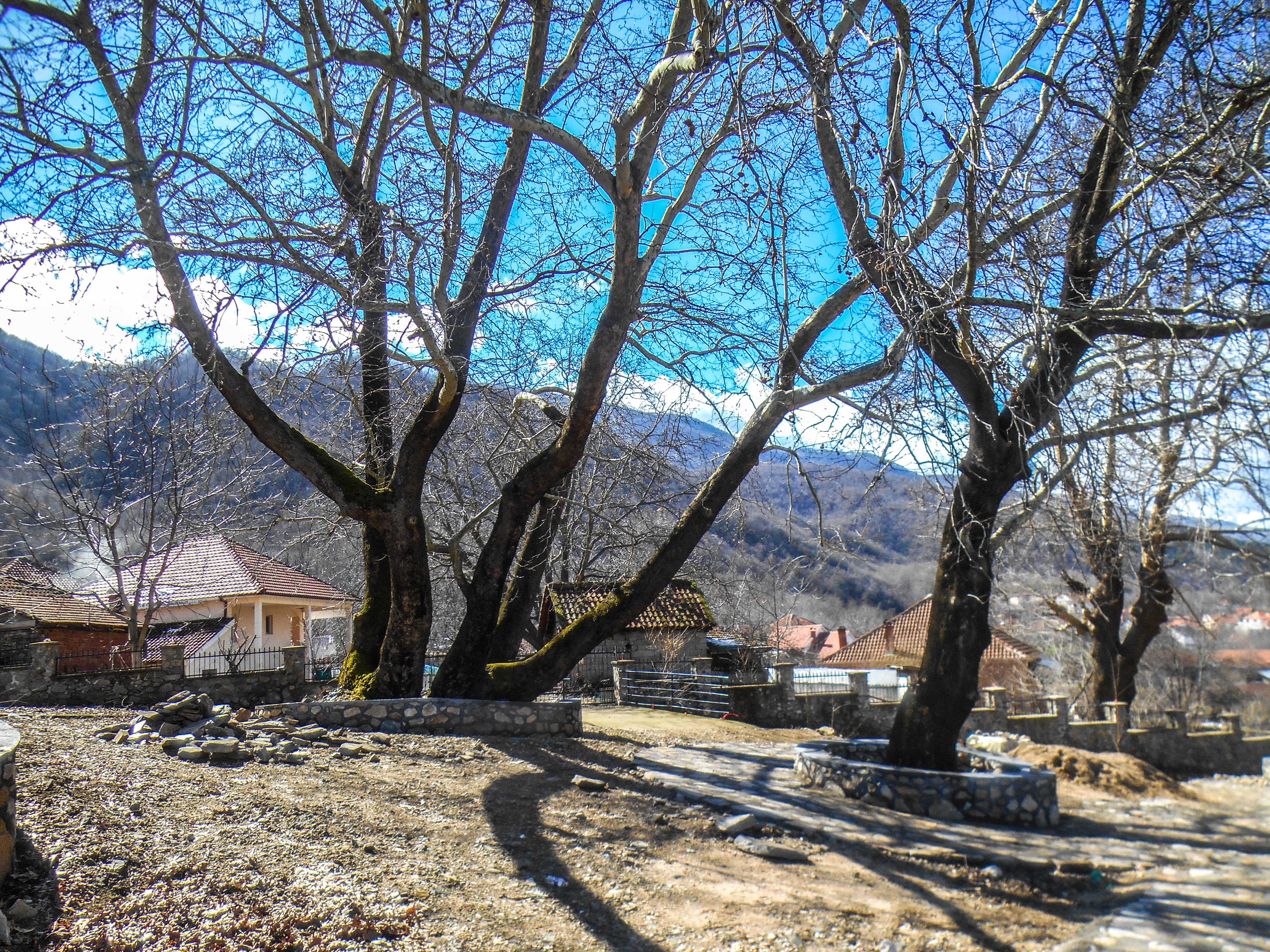 Мокриево